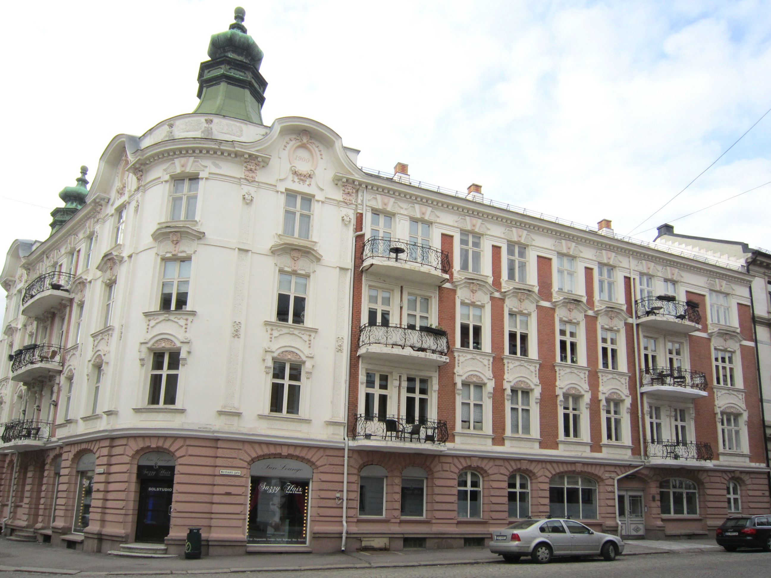 Begynnelsen av Nordraaks gate ved Solheimgata. Den avbildede gården har adresse Thomas Heftyes gate 47B.